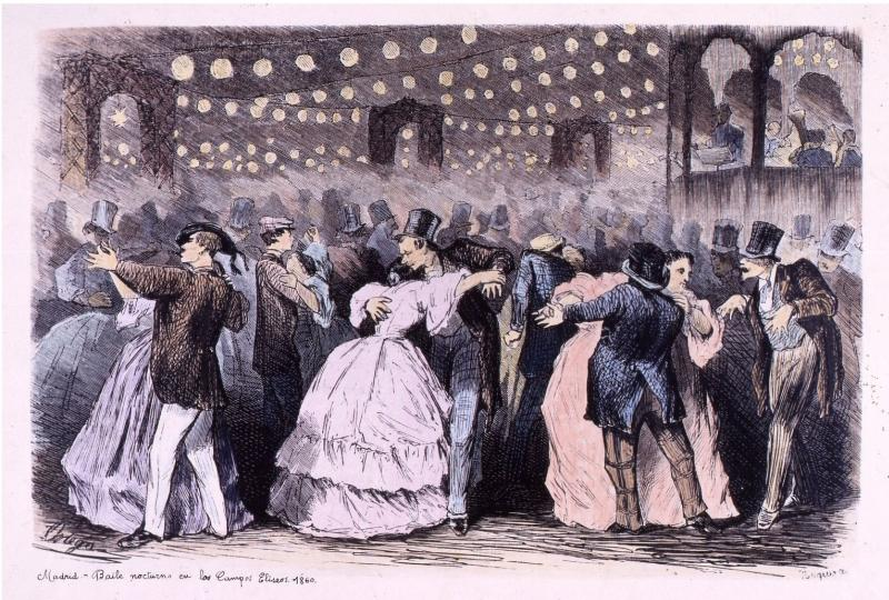 Baile de Carnaval en el recinto de verano de los Campos Elíseos de Madrid, construidos en 1864; dibujo de Calixto Ortega (el grabado original pudo ser publicado en El Museo Universal de Madrid hacia 1865).